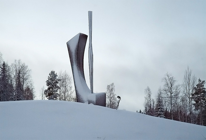 Nickelmonumentet i Loos